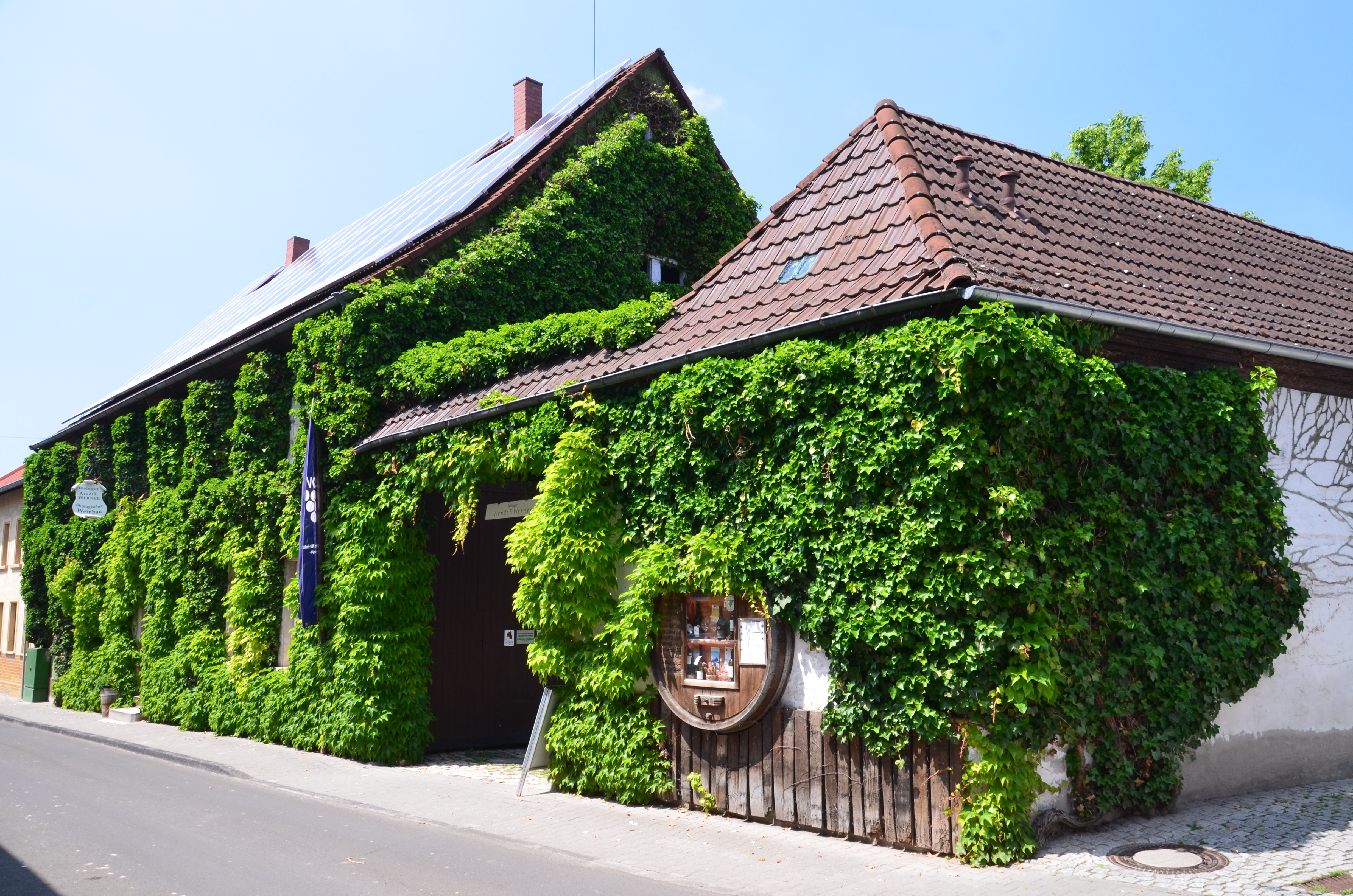 Frontansicht des Weinguts in der Mainzer Straße in Ingelheim